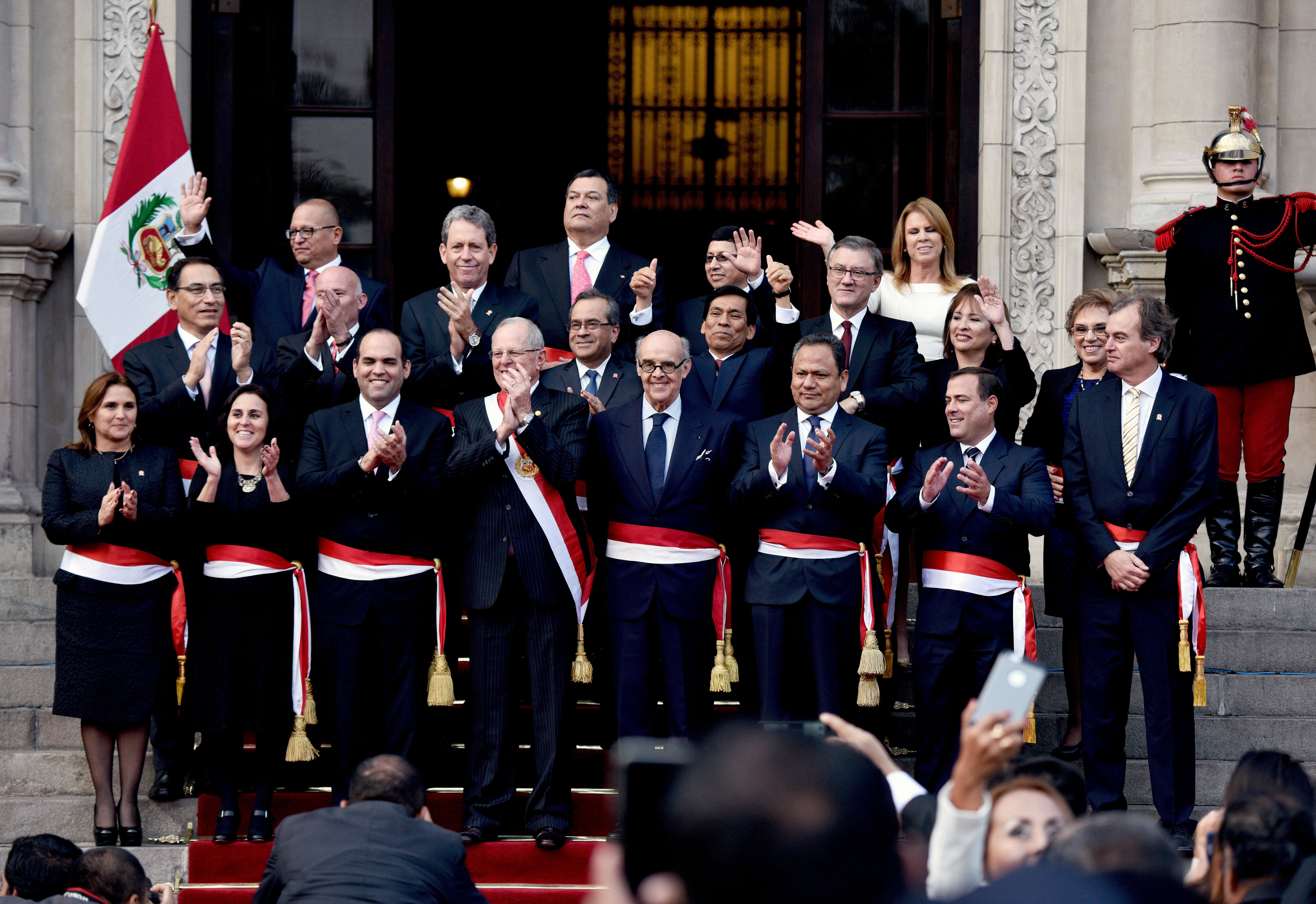 Presidente de la República Pedro Pablo Kuczynski tomó juramento al nuevo Canciller, Embajador Ricardo Luna Mendoza.